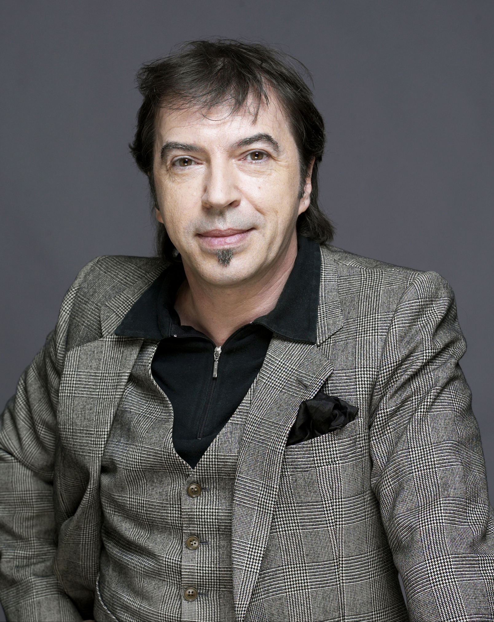 Portrait d'Adriano Sinivia, metteur en scène d'opéras